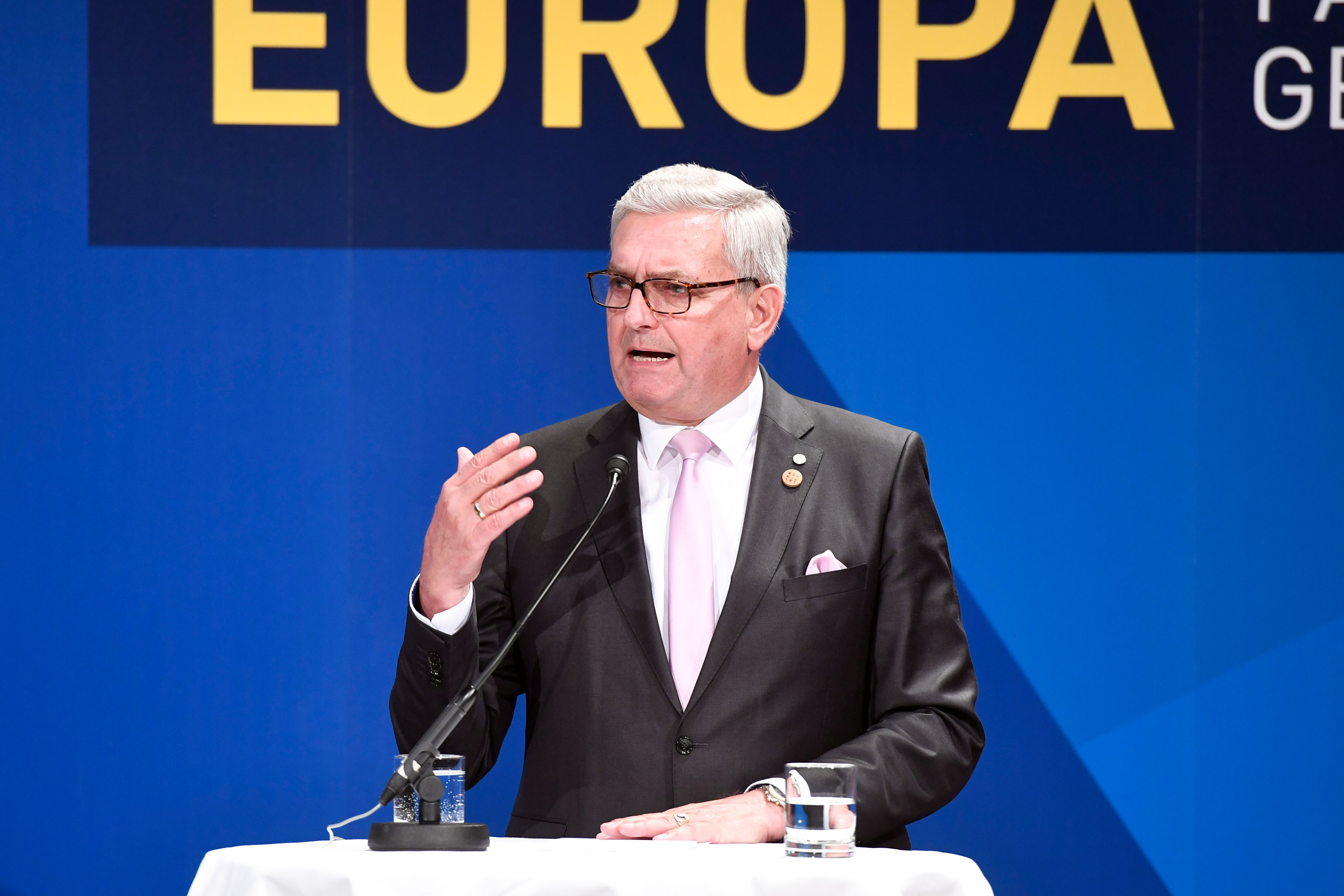 Wien am 16. November 2018, Auf Einladung von Außenministerin Karin Kneissl fand heute die 5. Generalversammlung der Europa-Gemeinderäte und Gemeinderätinnen in Wien statt. #EUGemeinderäte Am Programm standen zahlreiche Vorträge, sowie eine Podiumsdiskussion mit hochrangigen Experten und Workshops, um die EU-Gemeinderäte mit nützlichem EU-Wissen für ihre Tätigkeit auf kommunaler Ebene auszustatten. Im Rahmen der Veranstaltung wurde auch eine Absichtserklärung unterzeichnet, die die partnerschaftliche Fortführung des österreichischen Erfolgskonzeptes „Europa fängt in der Gemeinde an“ besiegelt. Foto: Mahmoud